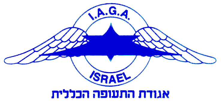 סמל אגודת התעופה הכללית בישראל